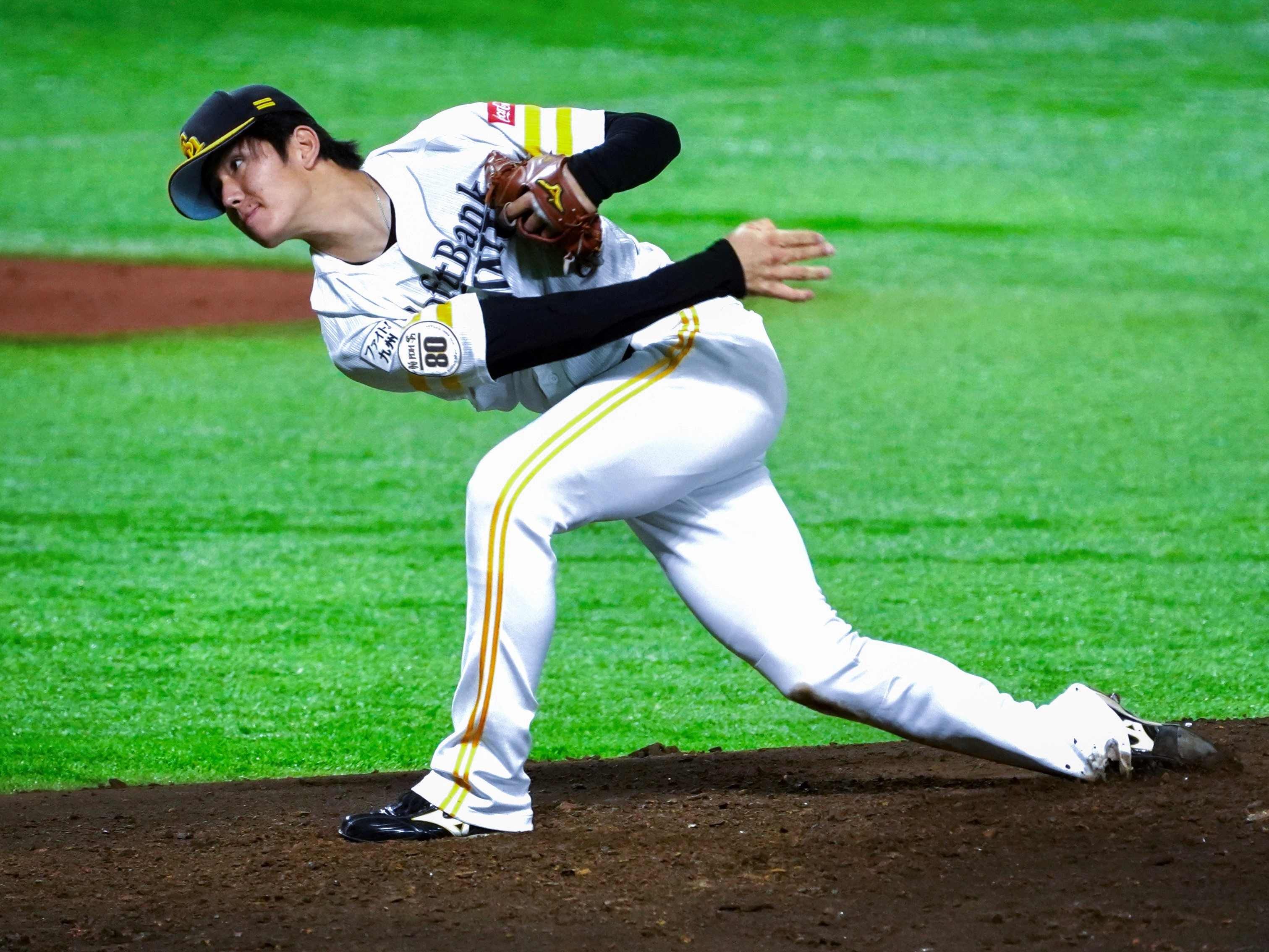 2018.10.03. ヤフオク！ドーム vs千葉ロッテ 高橋礼